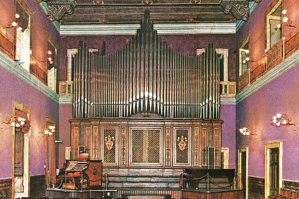 PIMS Roma - Mascioni